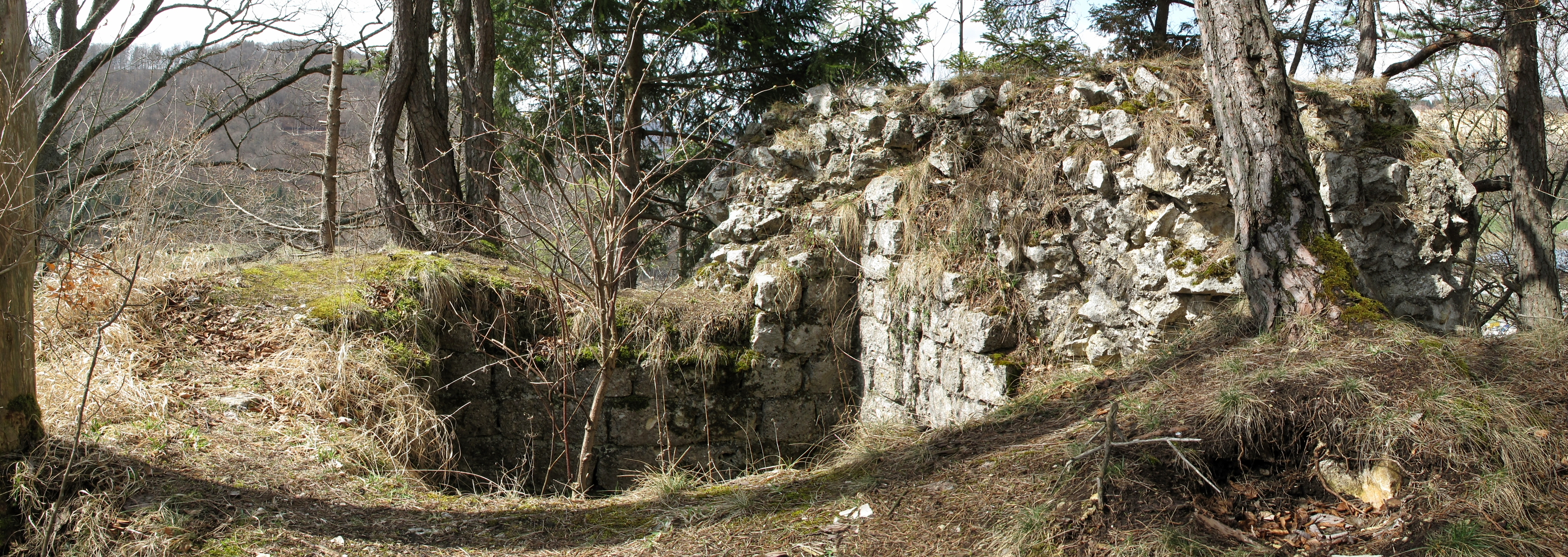 Die Turmruine mit der erhaltenen Innenschale des Untergeschosses.